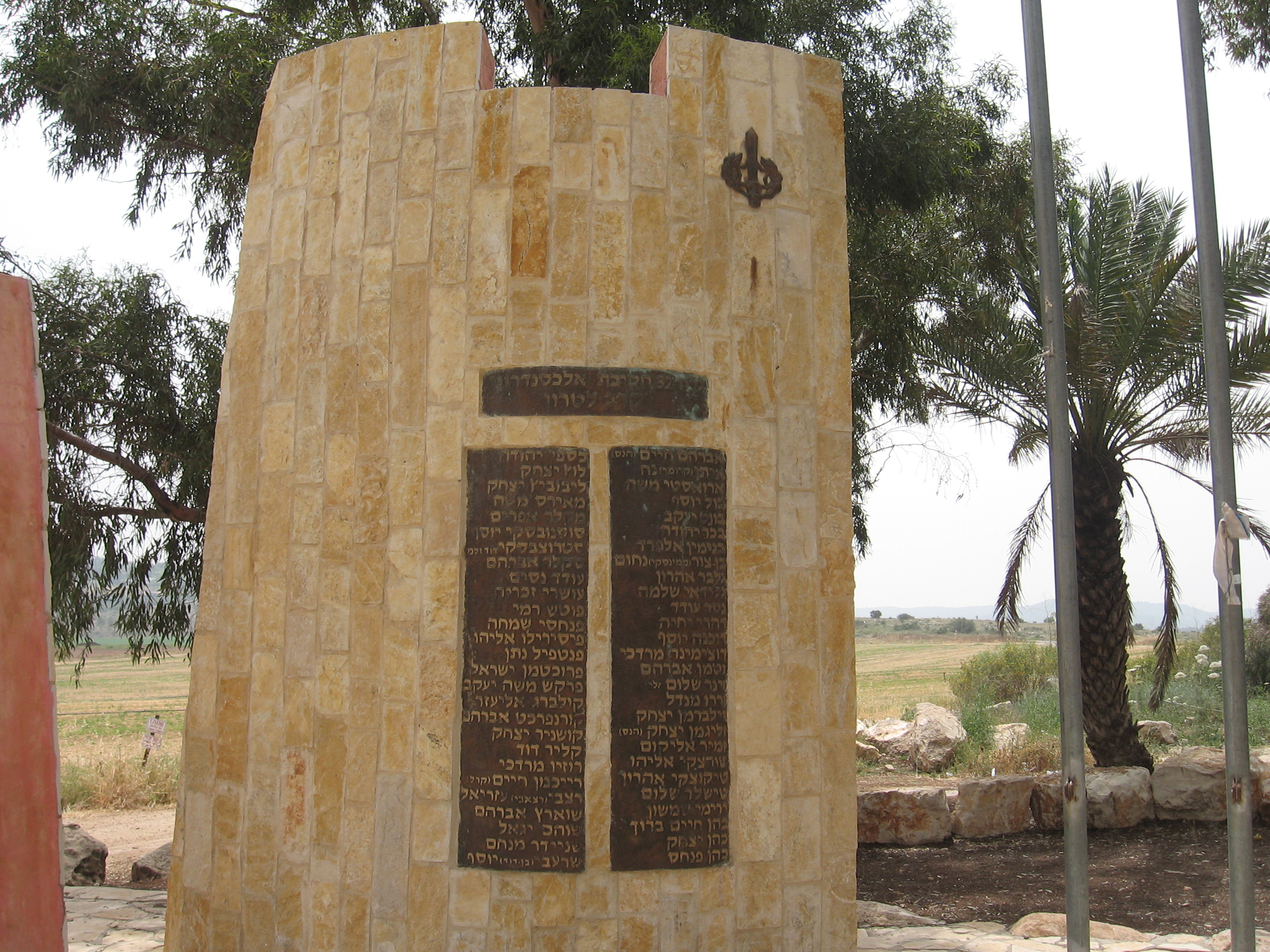 Andarta_alxsandroni